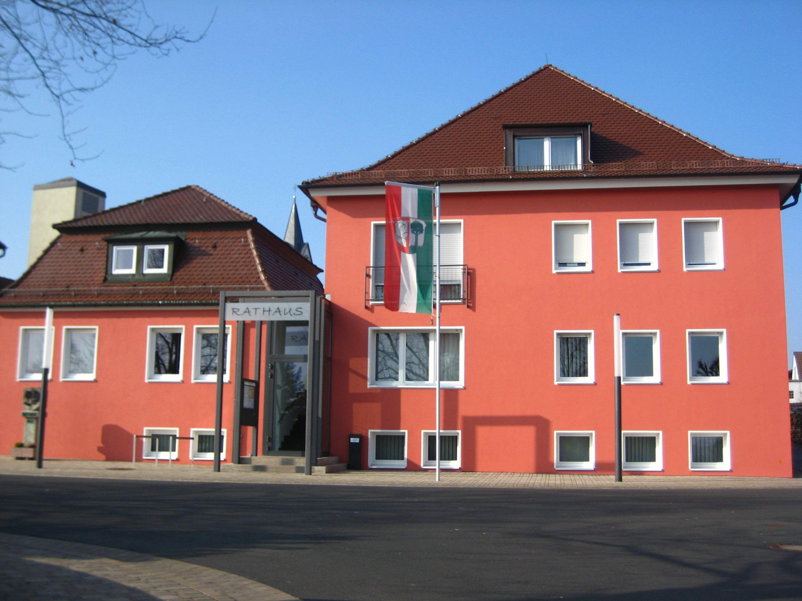 Rathaus